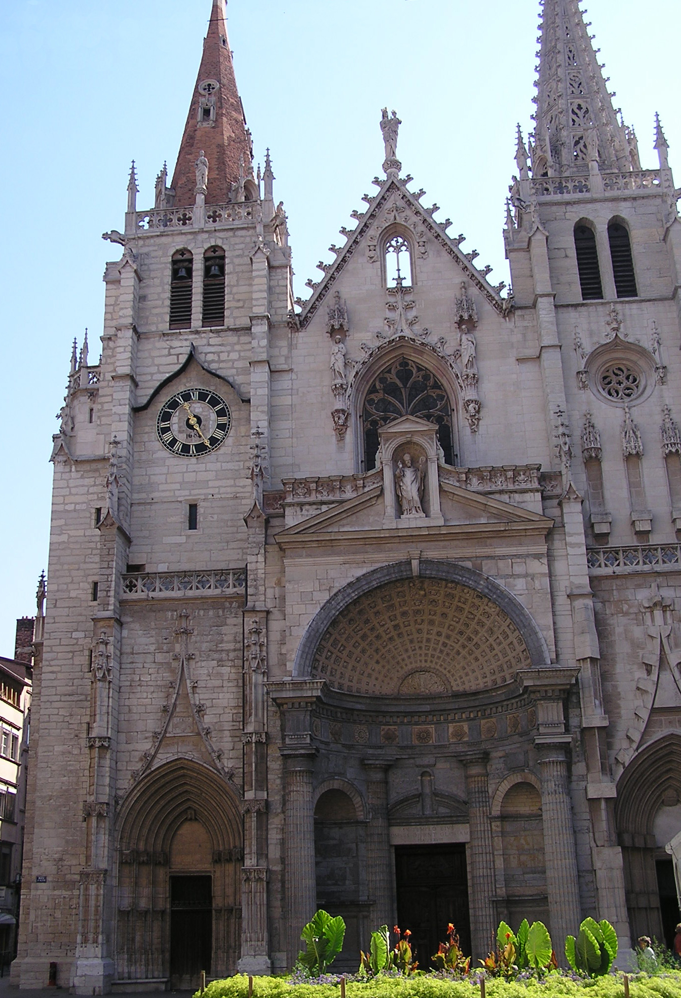 st nizier photo prise par--flayais 25 déc 2004 à 14:59 (CET) date de la photo : Une belle journée de l'automne 2003 (probablement en octobre)